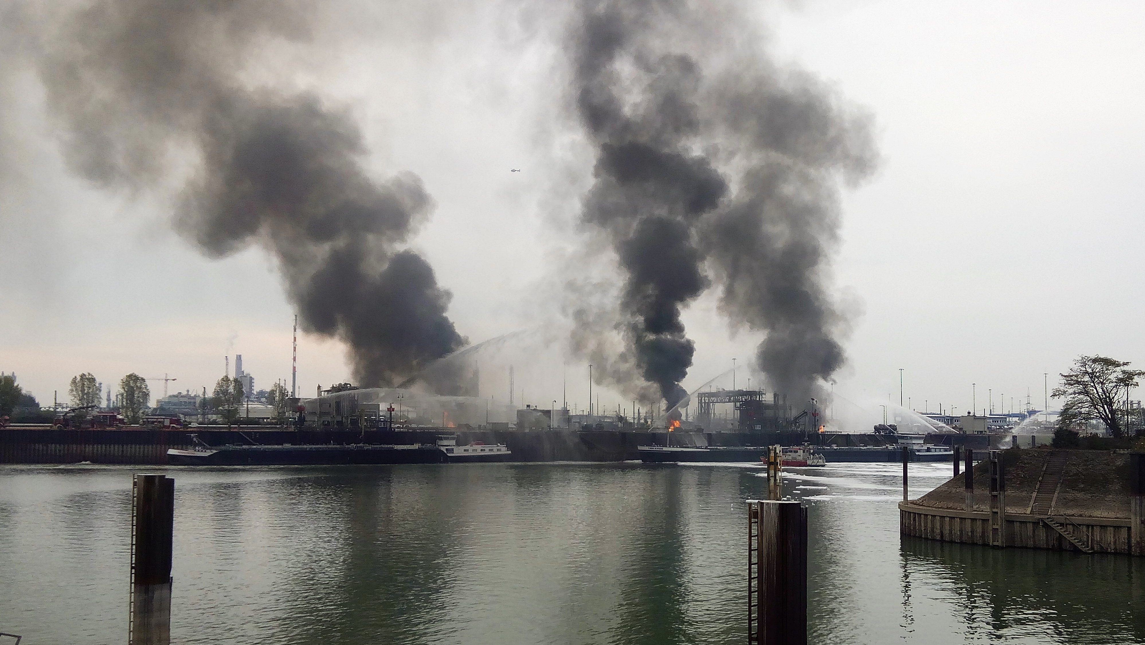 Unglücksstelle 17.10.2016, 12.55 h